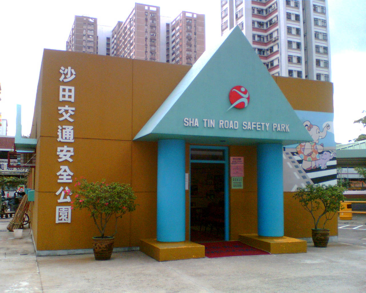 中文（香港）: 沙田交通安全公園。